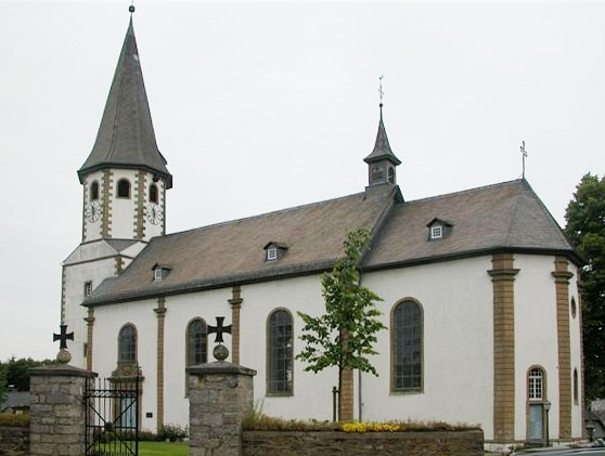 Church of Scharfenberg, Sauerland